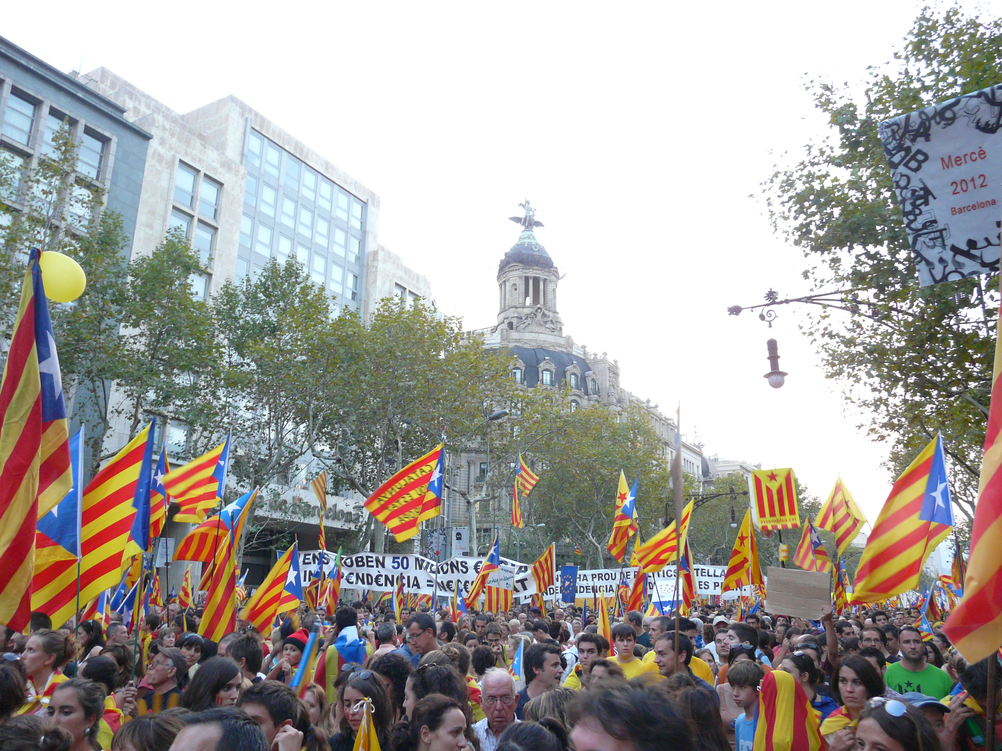 Edifici de La Unión y El Fénix Español (Barcelona) Object location41° 23′ 25.13″ N, 2° 09′ 59.72″ E